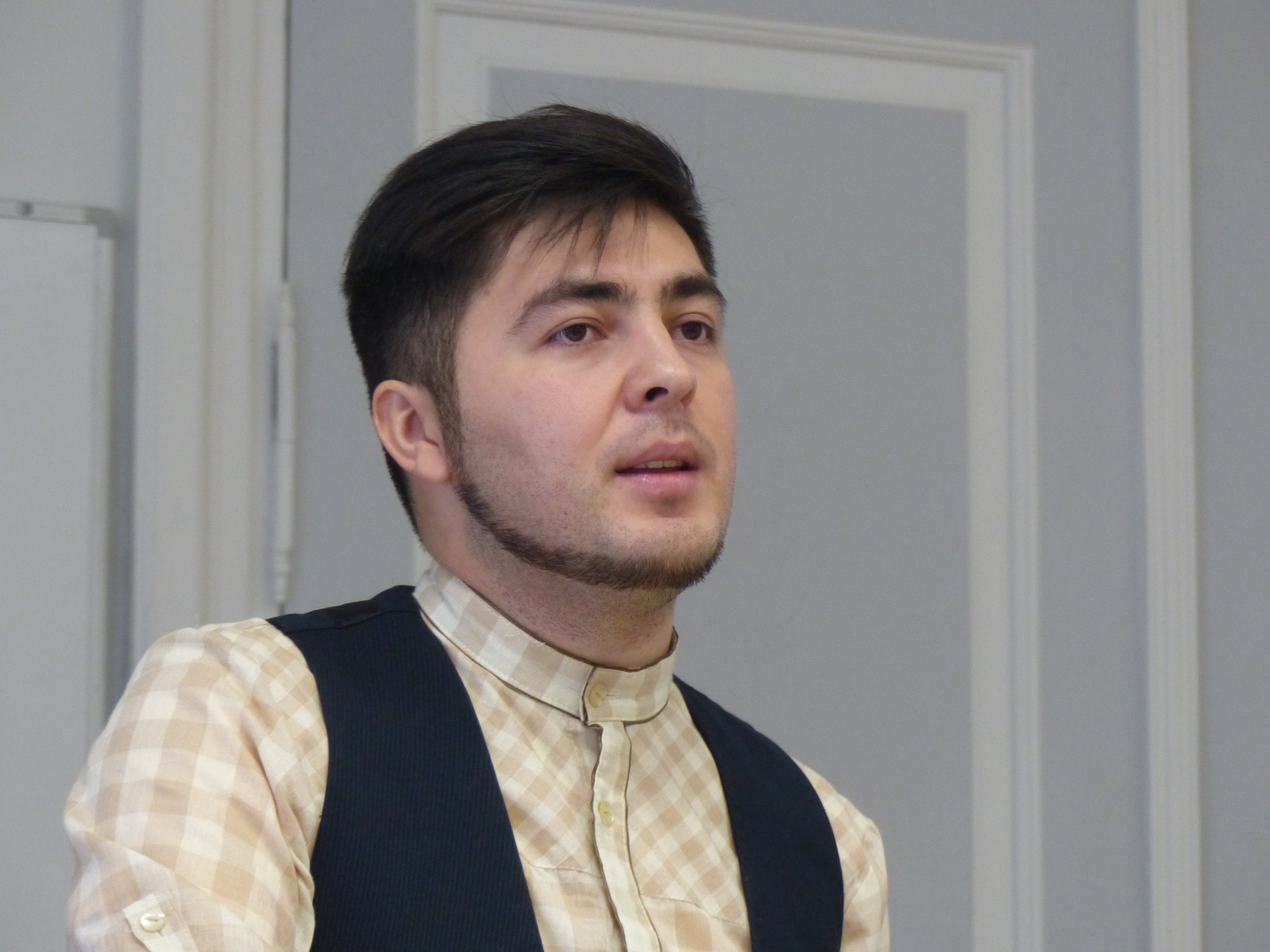 Nikolai Anisimov (Николай Владимирович Анисимов), 23.12.1989 udmurdi folklorist ja laulja